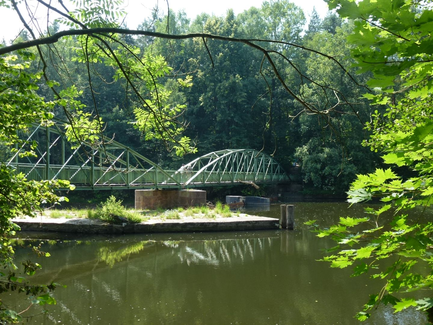 Muldebrücke bei Amerika